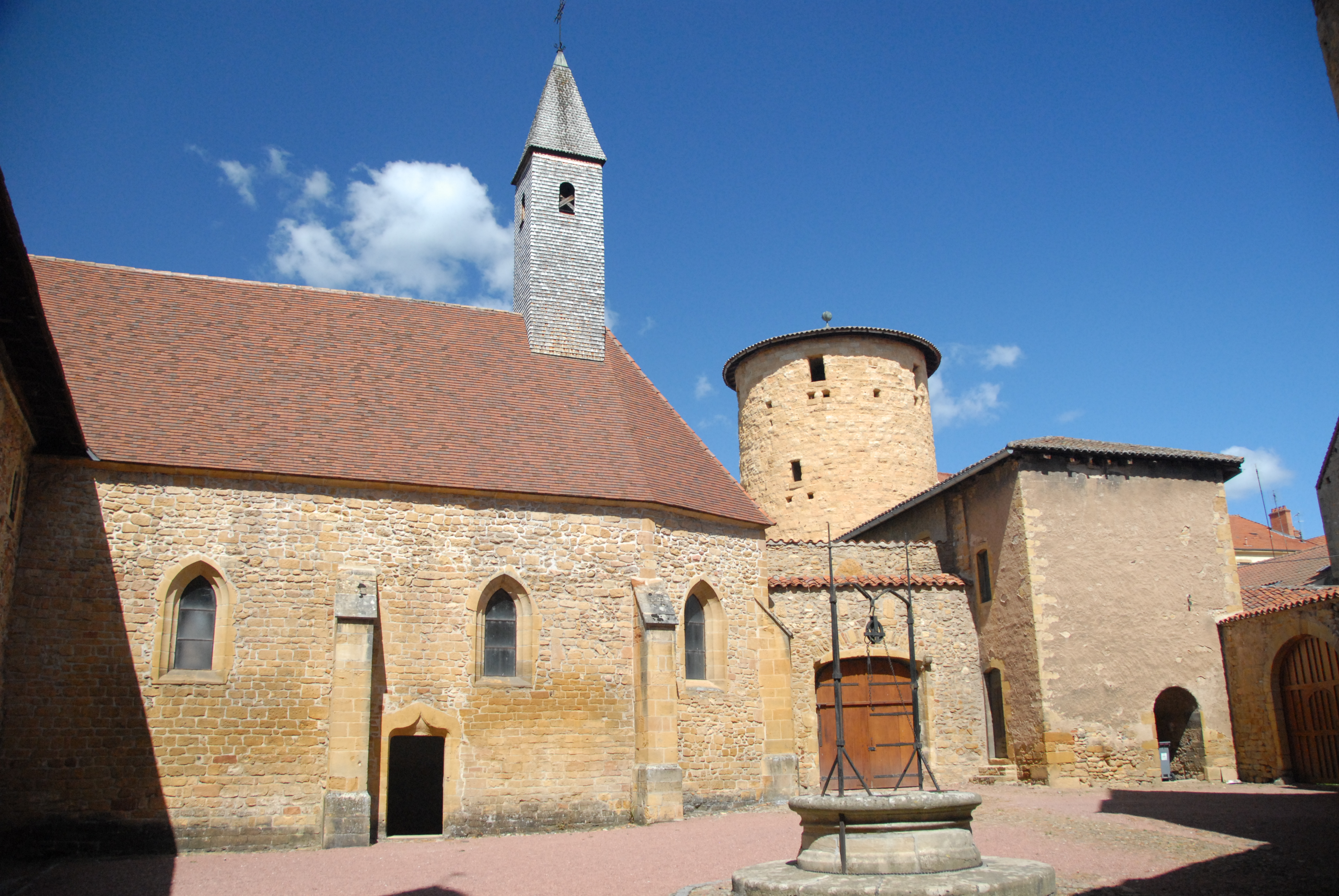 Kapelle von S